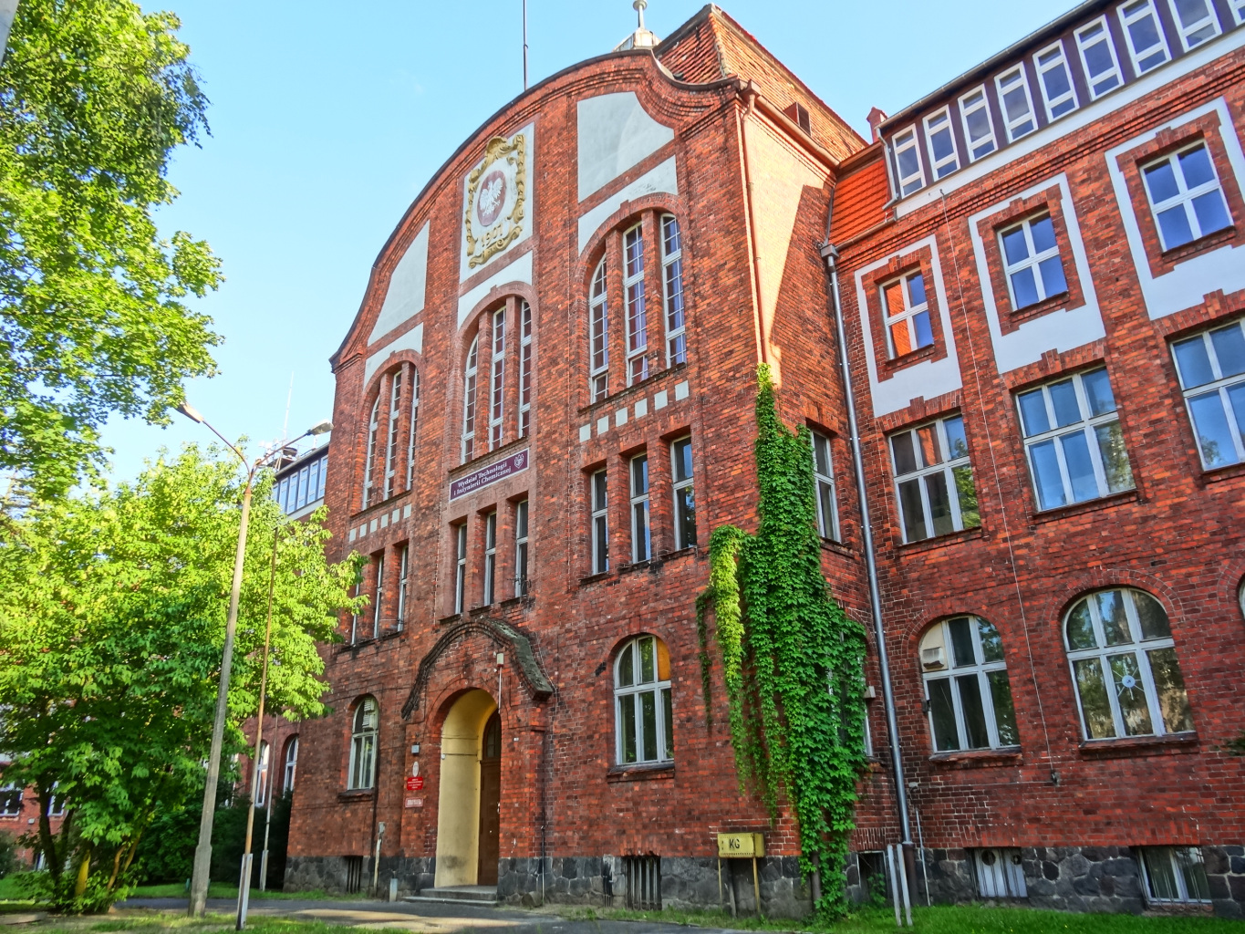 Budynek Wydziału Chemii UTP w Bydgoszczy, ul Seminaryjna 3 (inż. Huber z Berlina, 1905-08), dawniej katolickie seminarium nauczycielskie powołane w 1907 r.